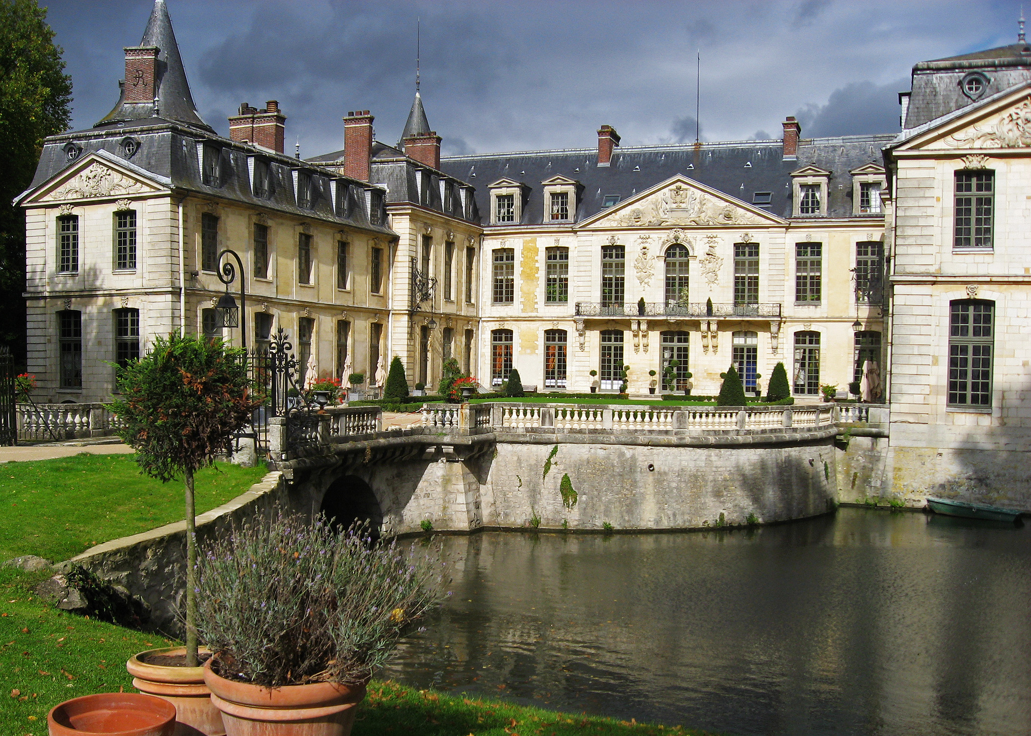 Chateau d'Ermenonville (Oise, France)